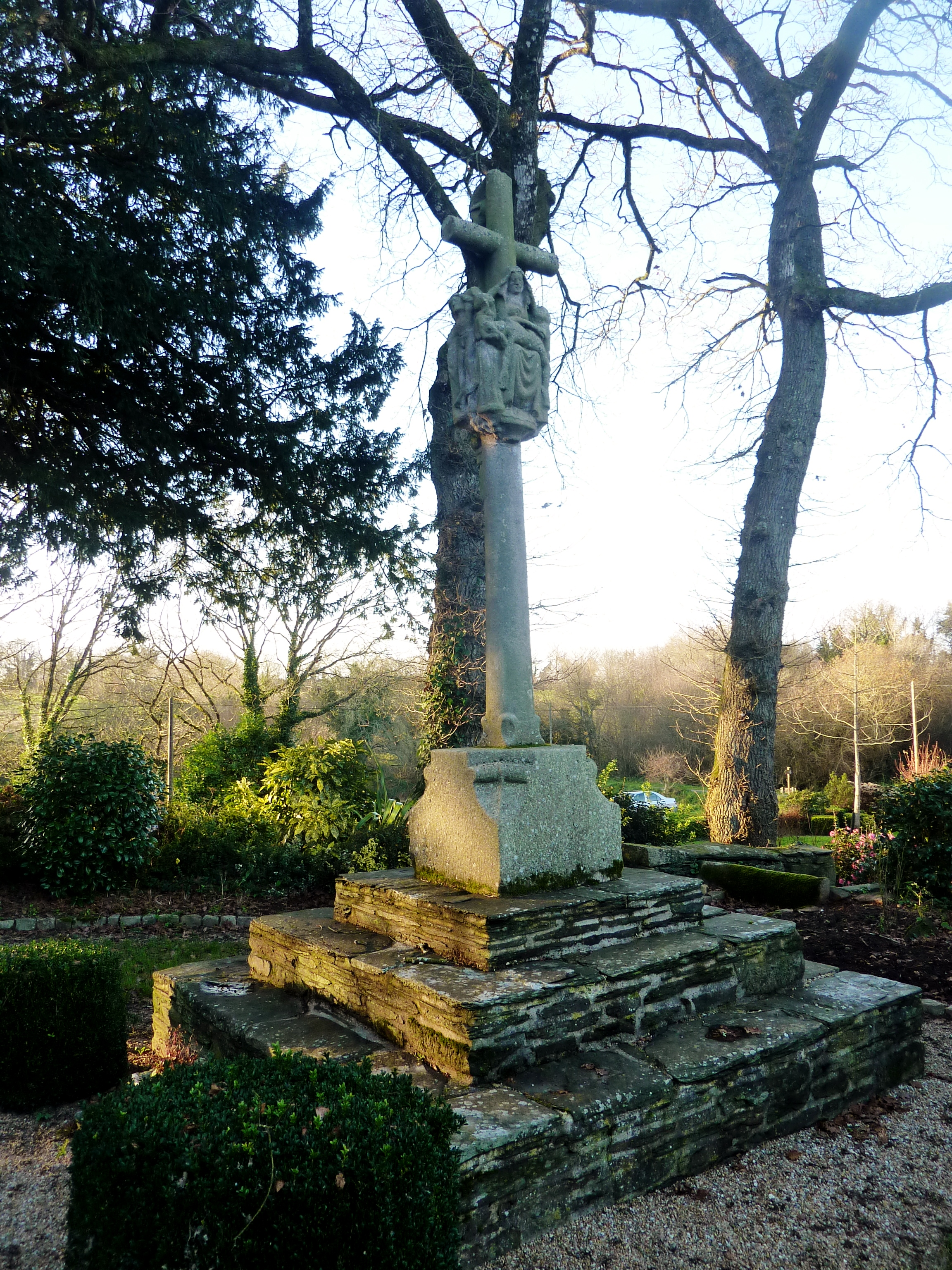 Châteauneuf-du-Faou : chapelle Saint-Ruelin du Moustoir, le calvaire du placître